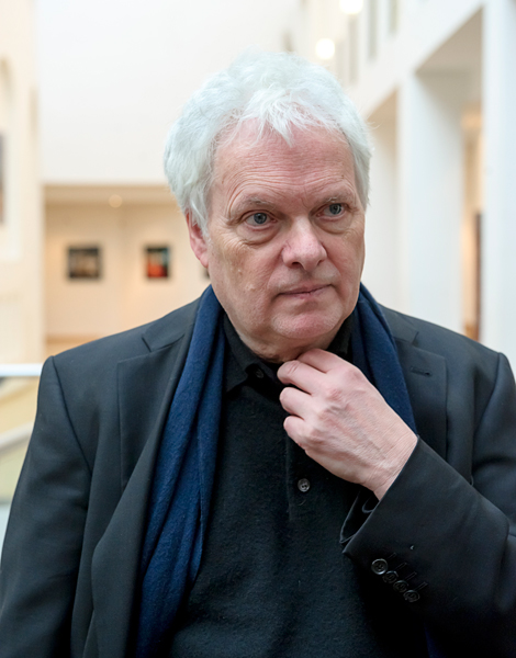 «Золотая маска» показала знаменитый спектакль Хайнера Геббельса «Вещь Штифтера»